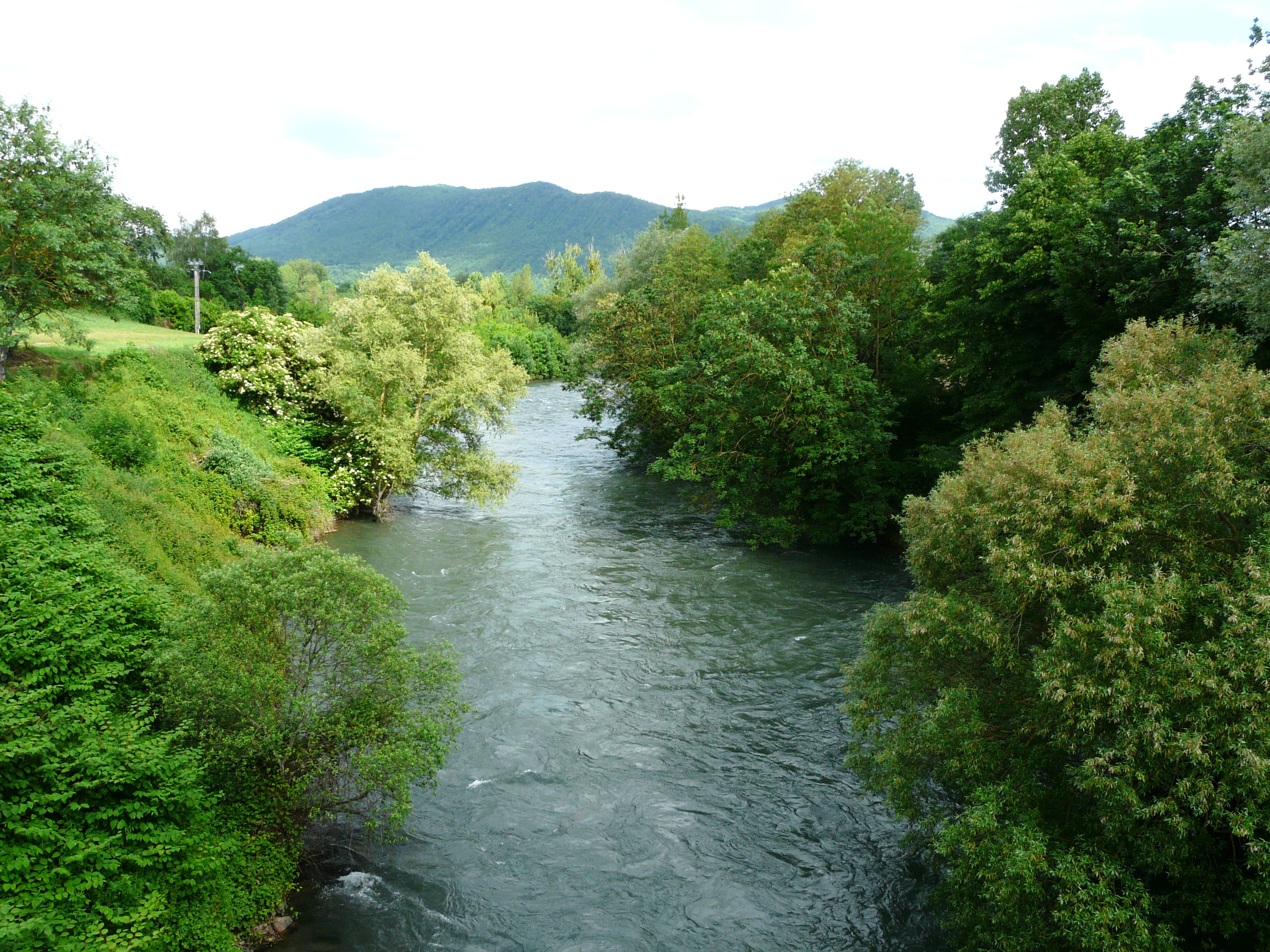 La Garonne en amont du pont de la route nationale 125, en limites de Labroquère (à gauche) et Valcabrère (à droite), Haute-Garonne, France.